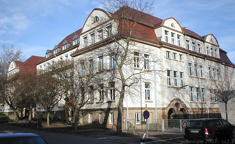 Grünewaldschule in der Grünewaldstraße in Heilbronn-Böckingen